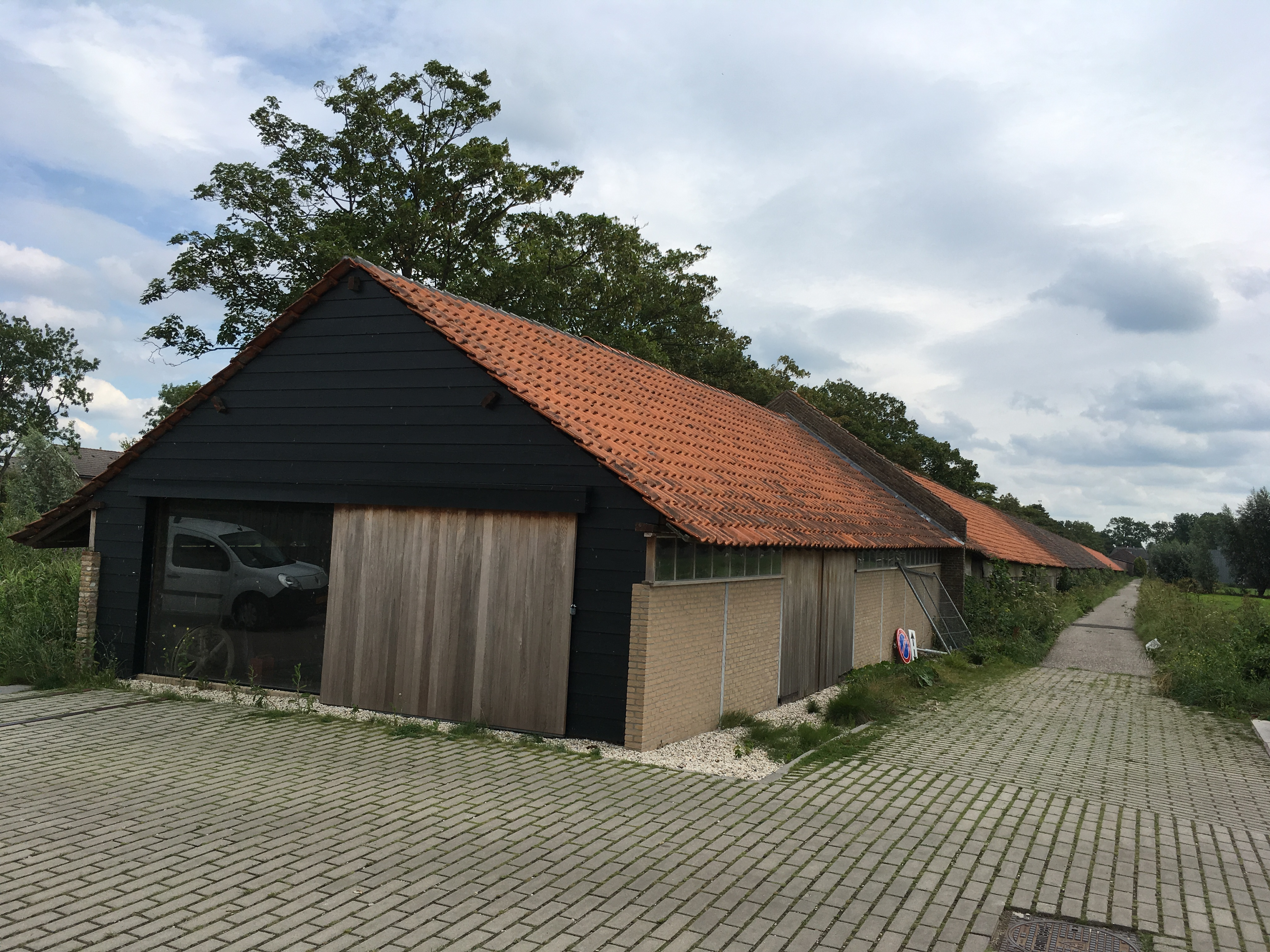 De historische lijnbaan bij touwfabriek G. van der Lee te Oudewater. Nog altijd in gebruik.